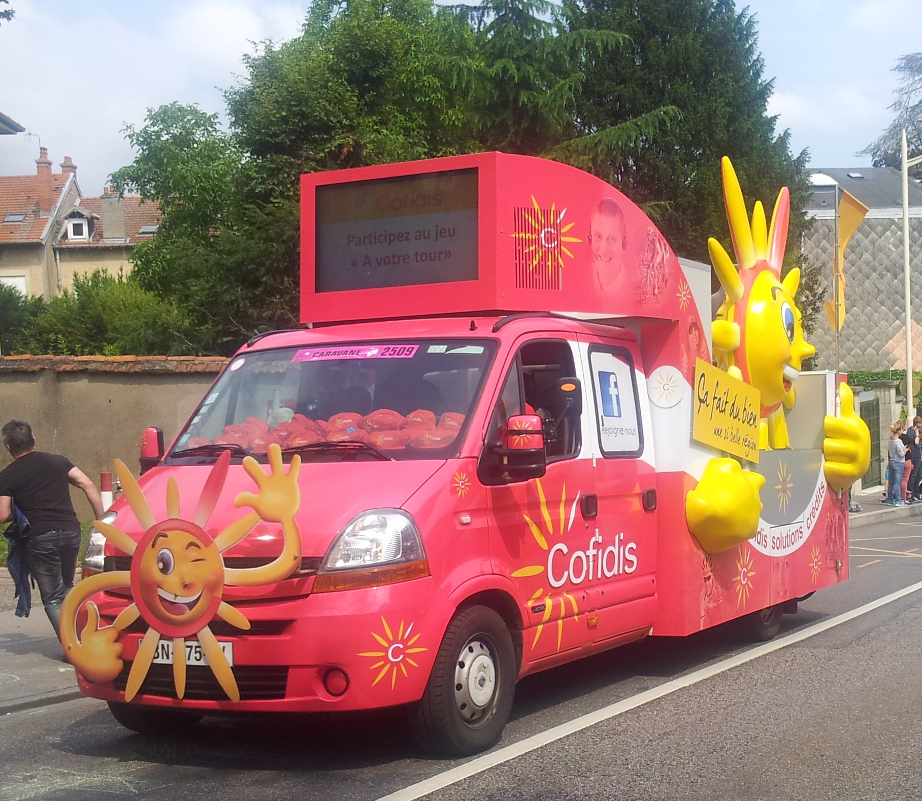 Véhicule de la caravane du Tour de France 2014 dans la côte de Boufflers à Nancy (7e étape).